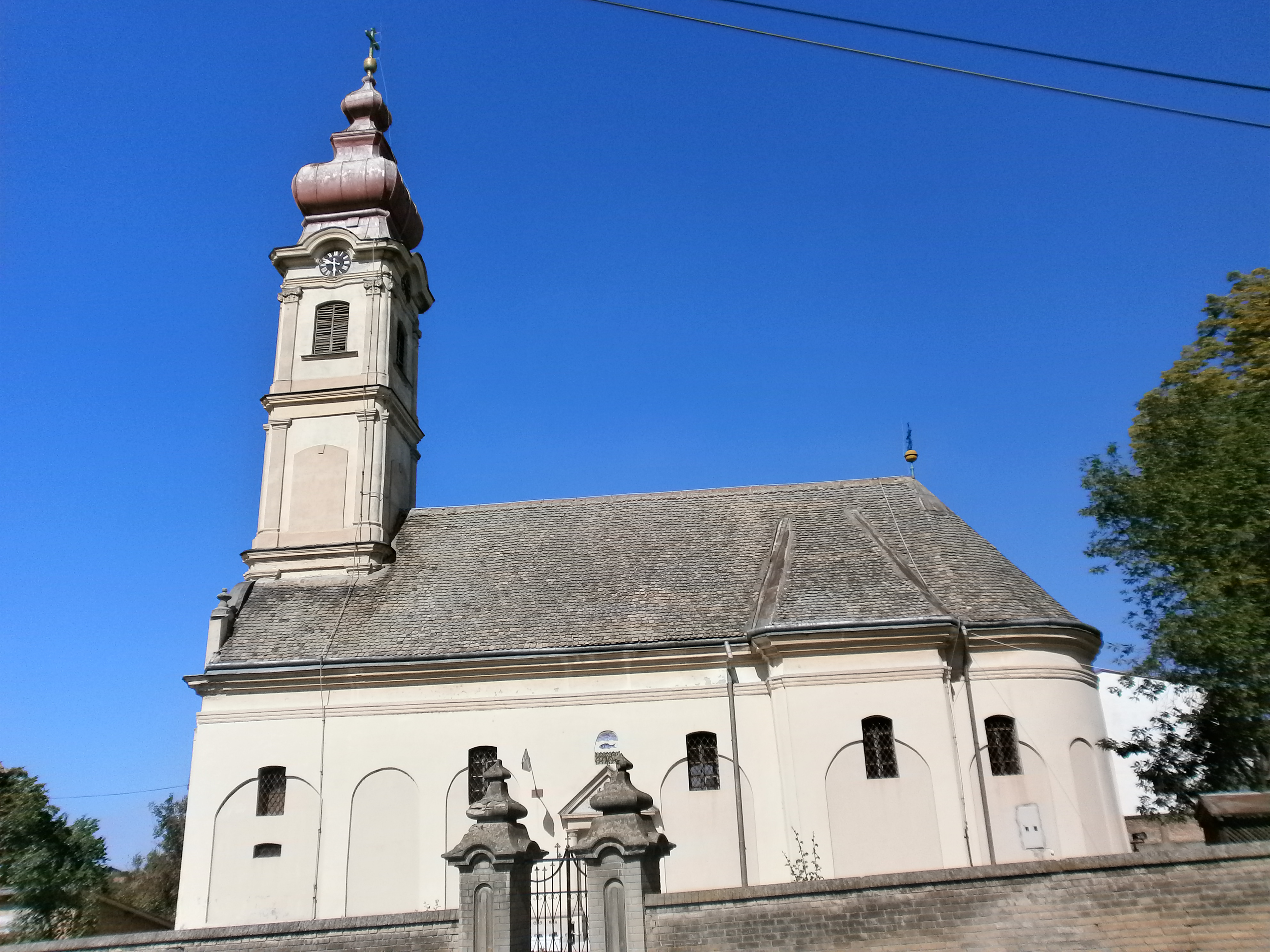 Српска православна црква Св. Николе у Руми